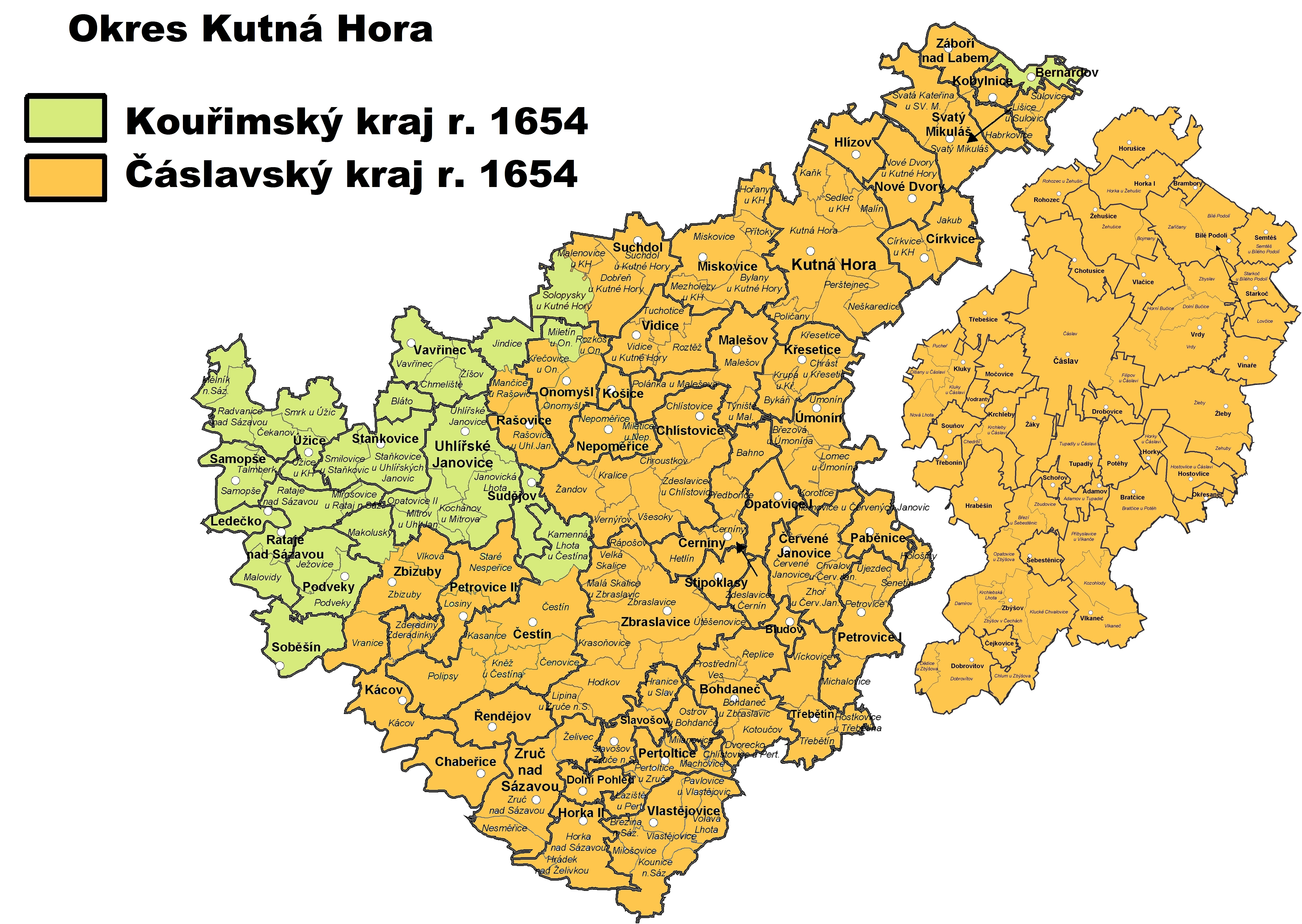 Čáslavský kraj r. 1654 v dnešním okrese Kutná Hora